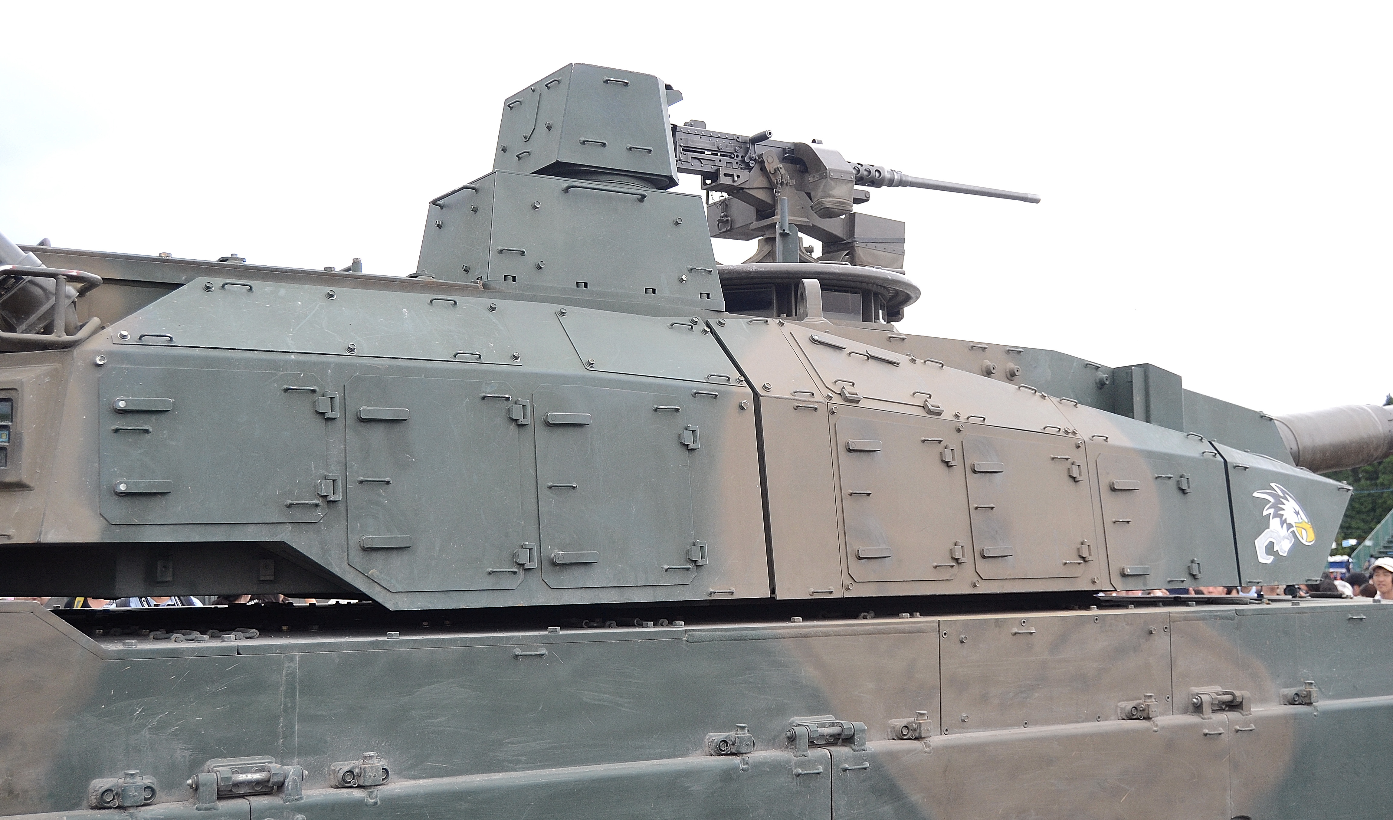 陸上自衛隊の10式戦車の砲塔（2015年の東富士演習場で行われた富士総合火力演習において撮影）